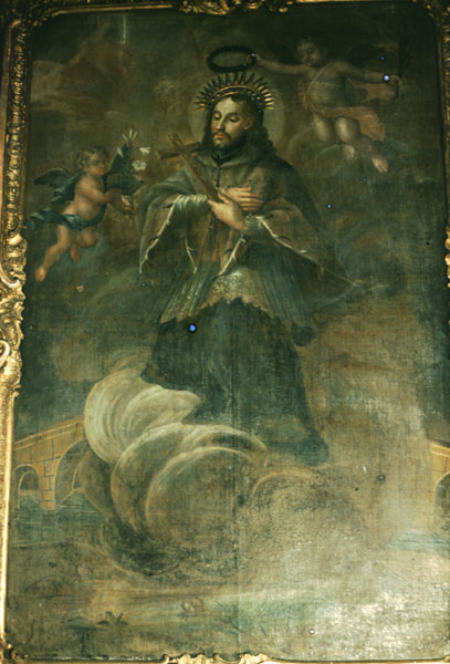 «Праслаўленне святога Францішка». XVIII ст. Палатно, алей. Чарняўчыцы, Брэсцкая вобл